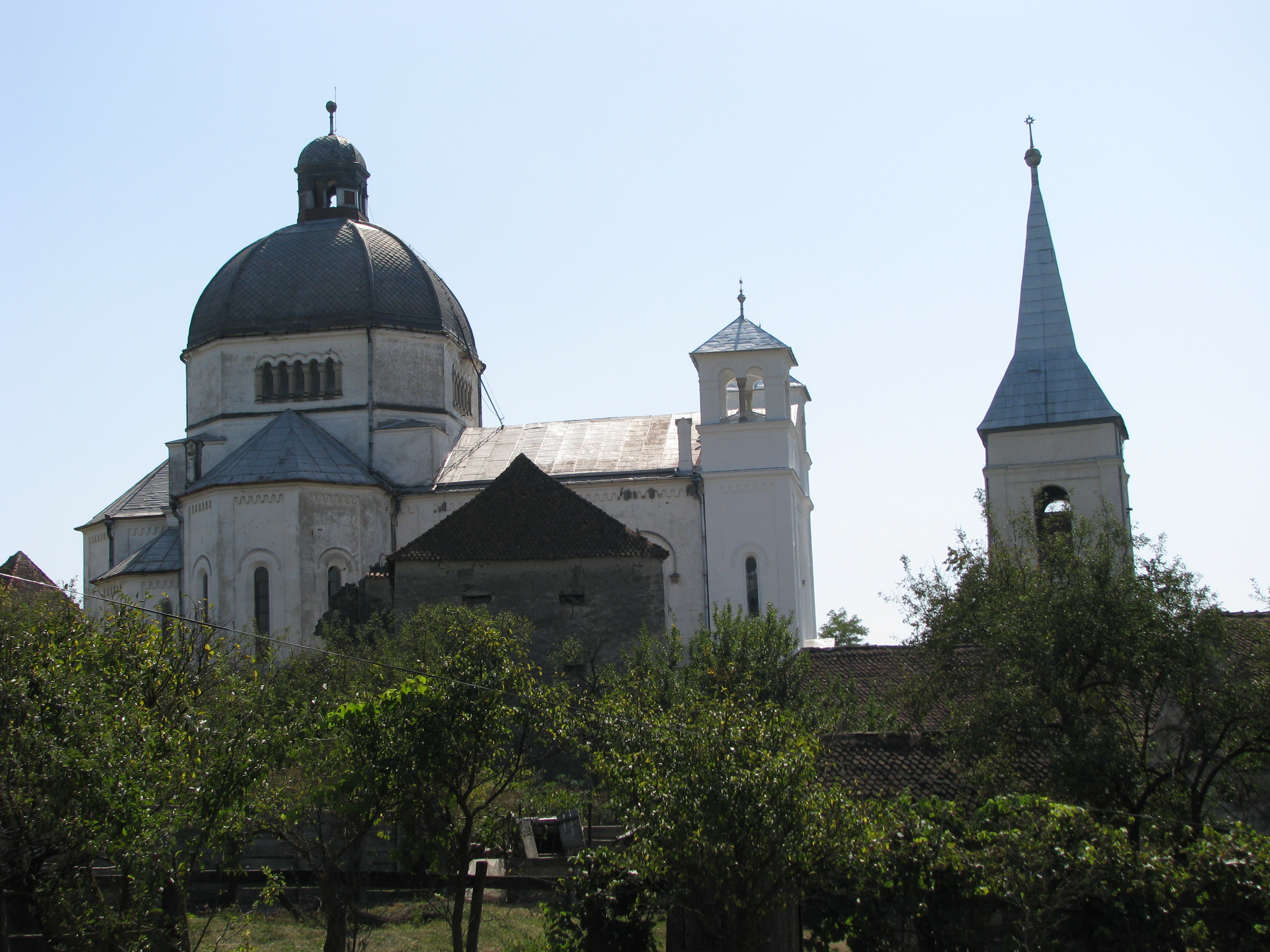 Bölöni unitárius templom 01